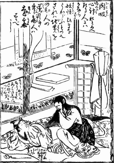 Nikusui (肉吸) from Hyakkiyakō-Bakemonogatari (百鬼夜講化物語)